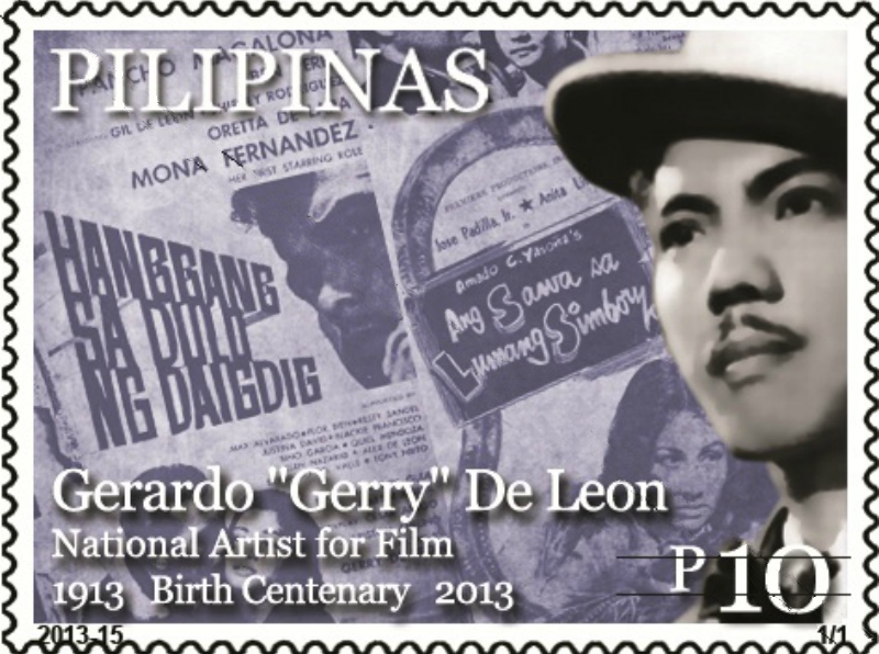 Gerardo de León Gerardo de León